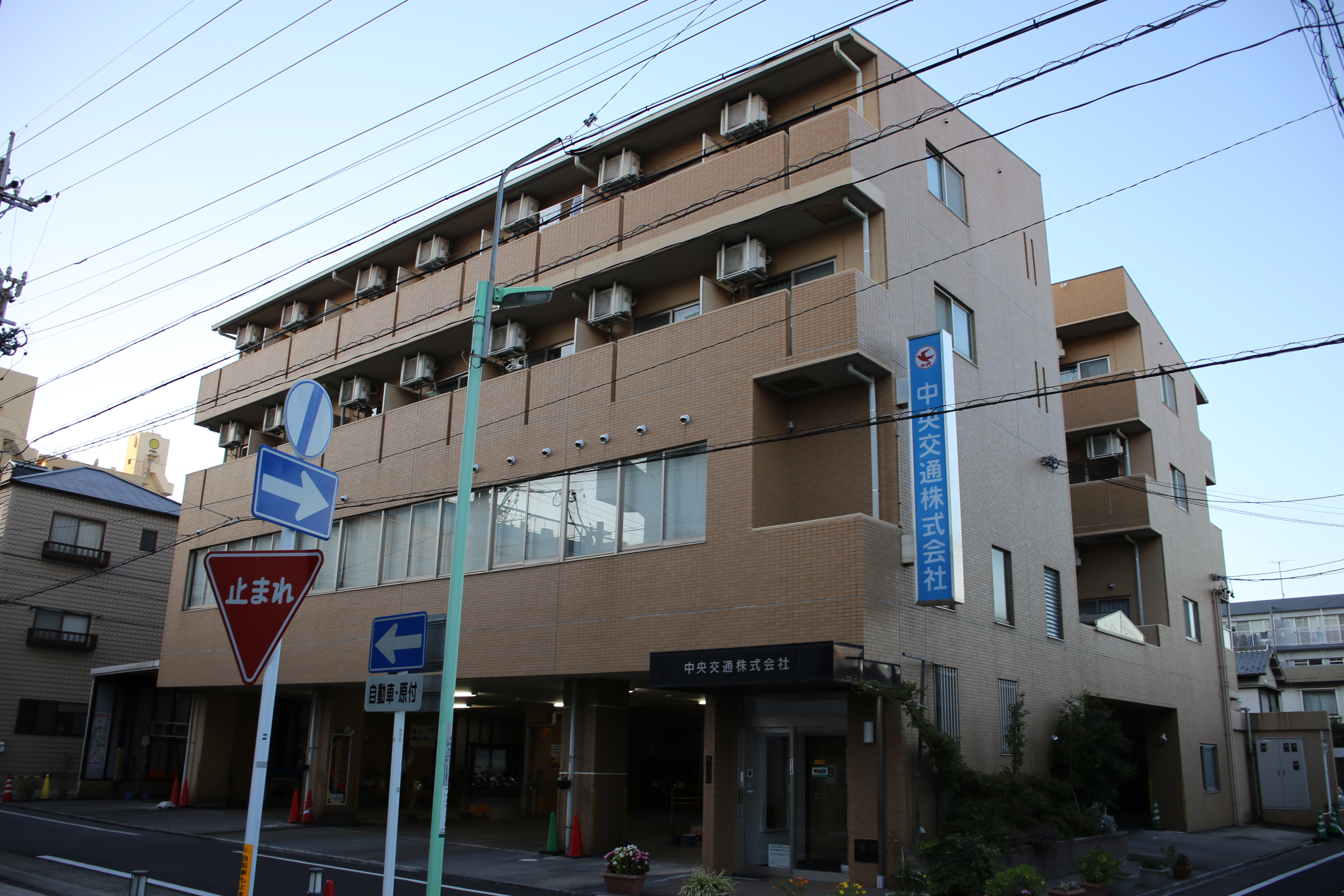 名古屋市中村区寿町の中央交通本社を南側公道東側より撮影